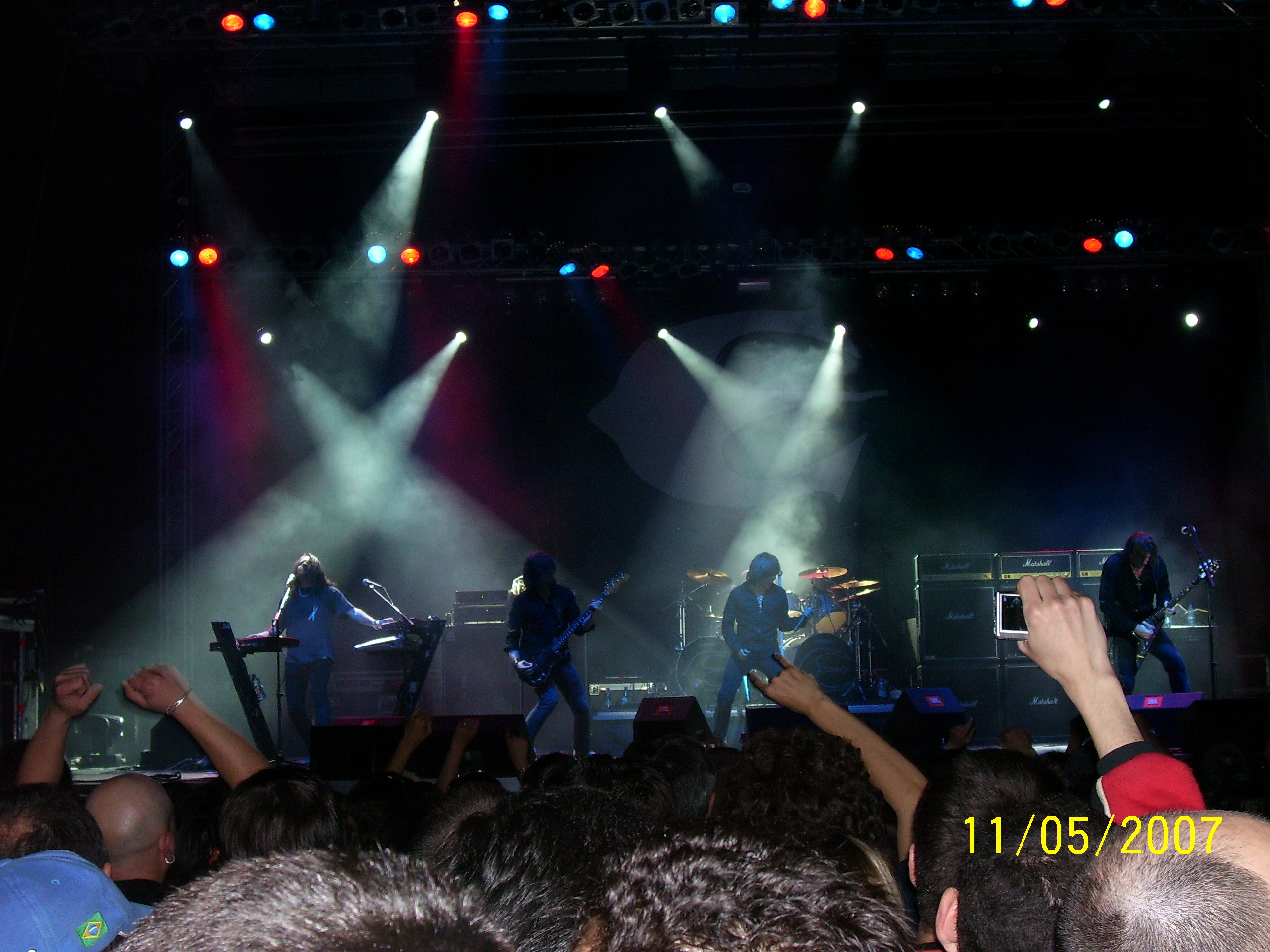 Снимката е направена от мен в Ловеч.